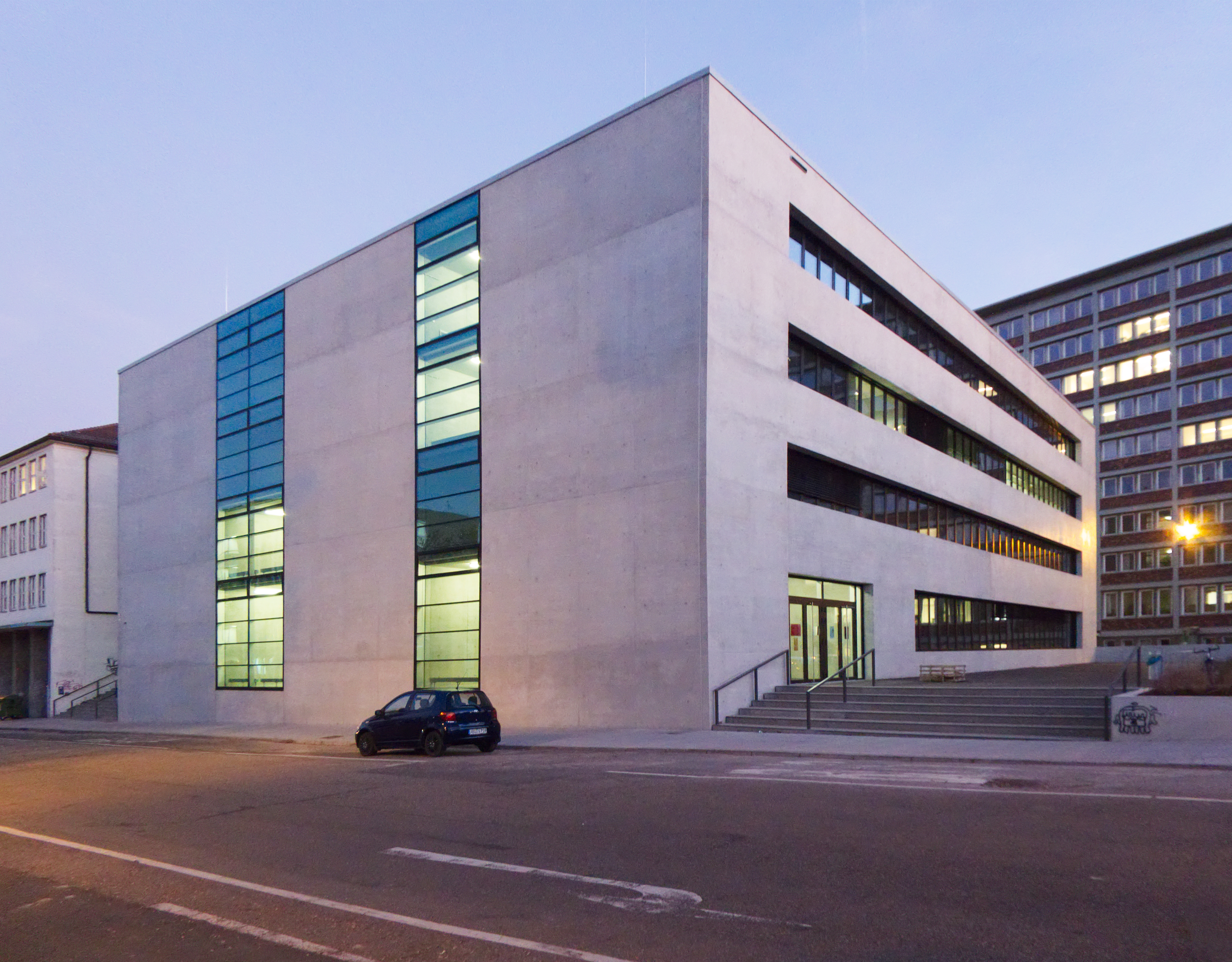 Erweiterungsbau Bau 8 der Hochschule für Technik Stuttgart